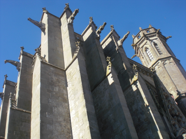 Katedralo de Karkasuno